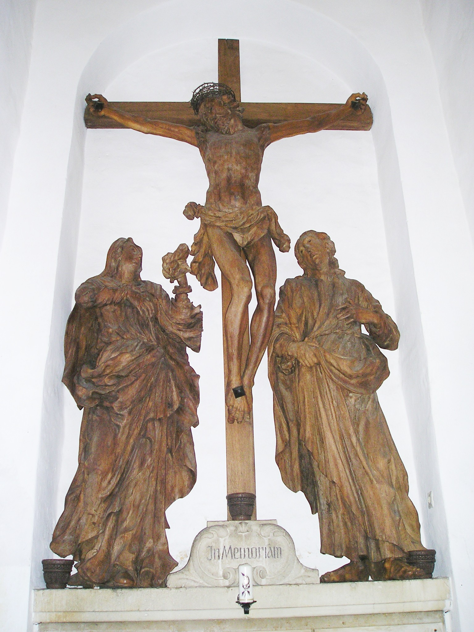 Kreuzigungsgruppe in der Pfarrkirche von Nassenfels (Landkreis Eichstätt, Oberbayern), dem Barock-Bildhauer Christian Handschuher zugeschrieb, um 1700 entstanden.